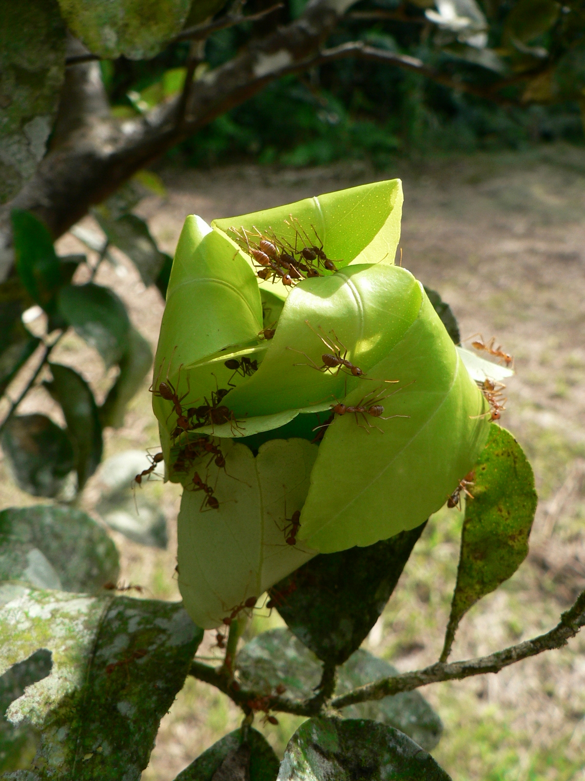 Afrikanische Weberameisen (Oecophylla longinoda) am Nest (aufgenommen in Kamerun, Banyang Mbo Research Station)